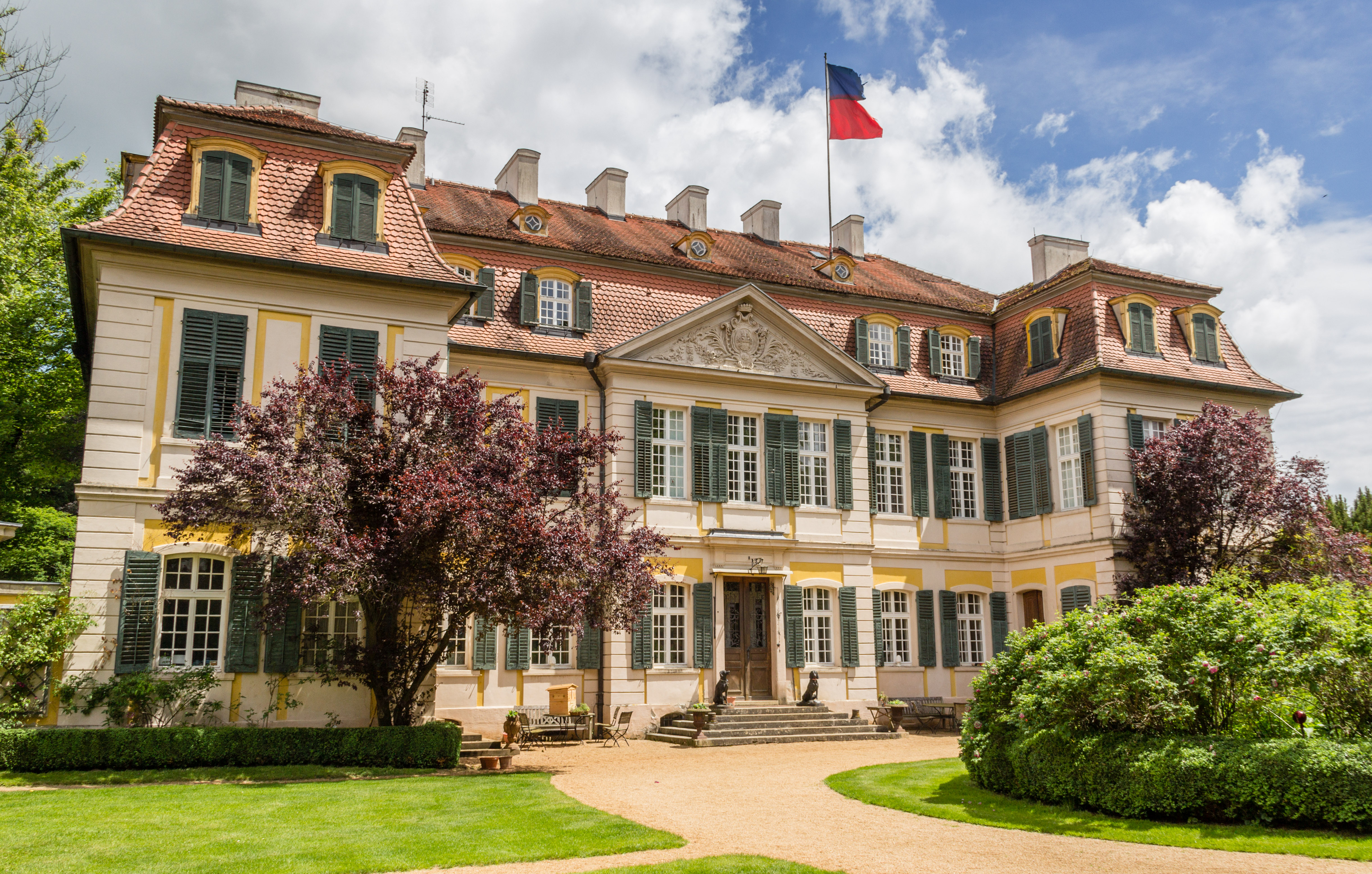 Dennemlohe, Schloss DennenloheThis is a photograph of an architectural monument.